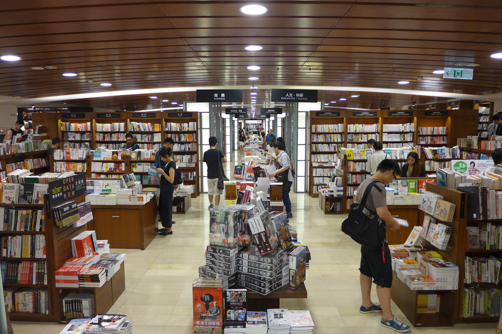 Eslite Bookstore Dunnan Interior